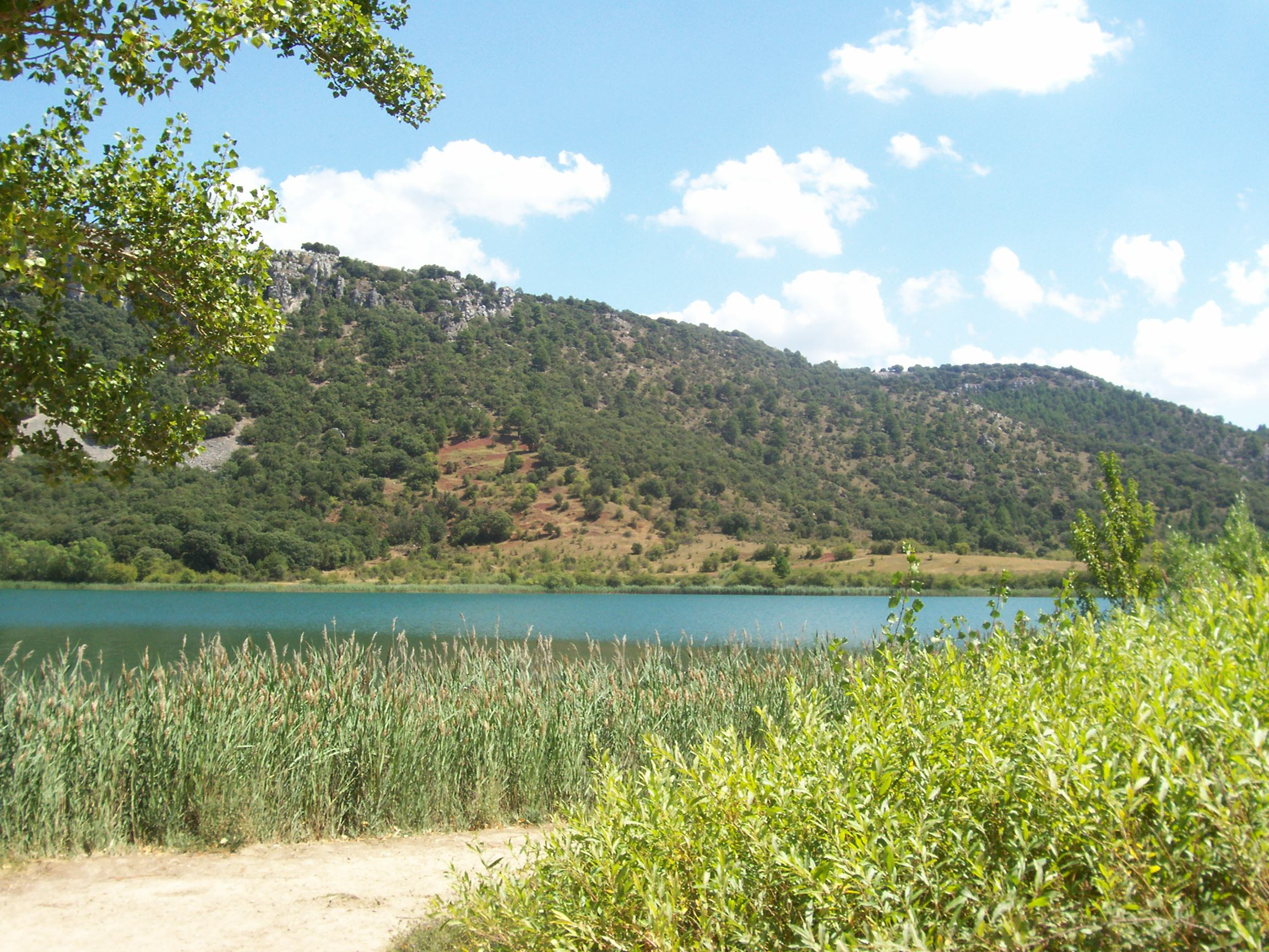 En la comarca de Beteta, al norte de la Serranía de Cuenca, se encuentra la laguna de El Tobar, rodeada de mimbreras. This is a photography of a Site of Community Importance in Spain with the ID: ES4230014. Natura2000 entry, EEA entry